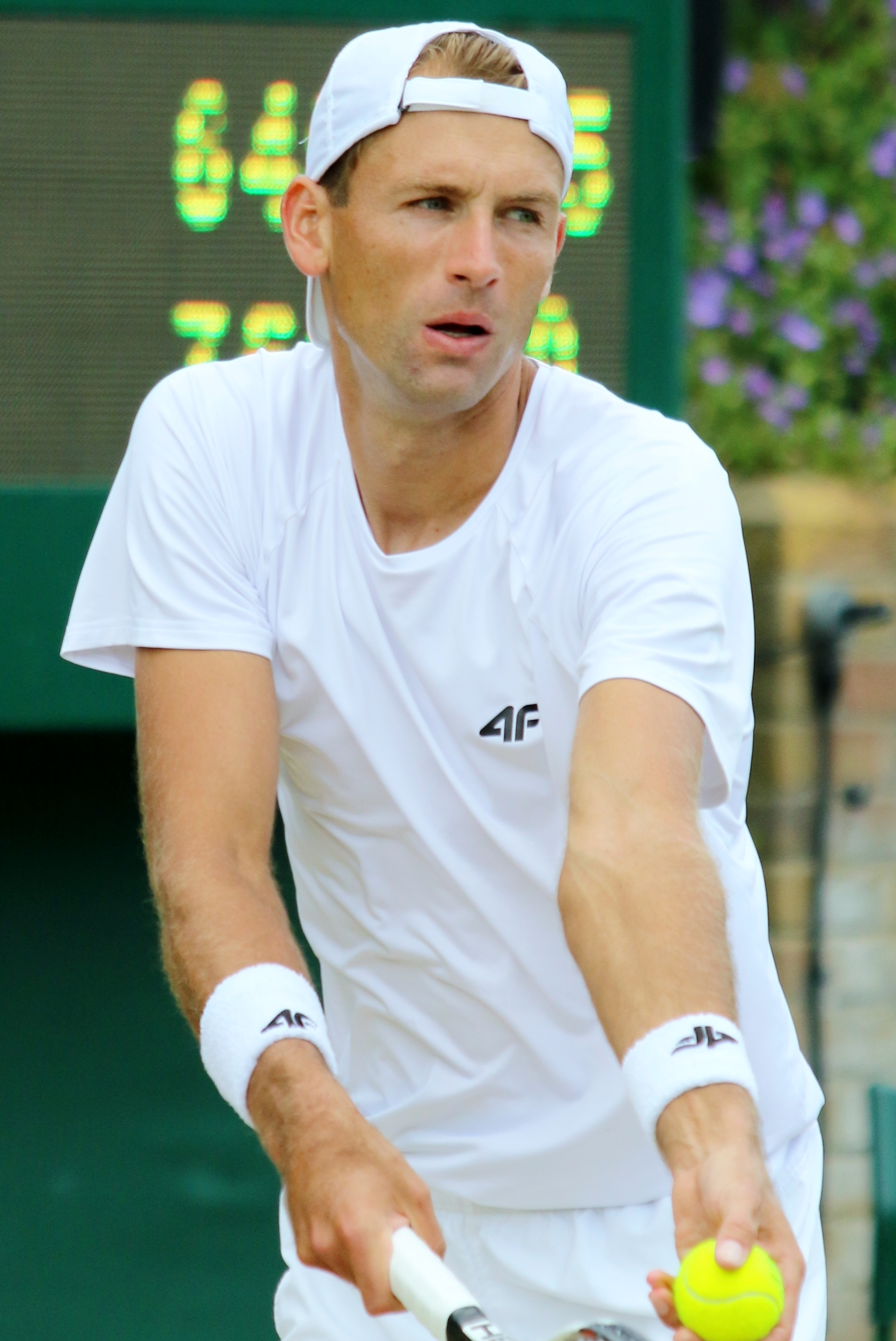 Kubot WM17 (2)